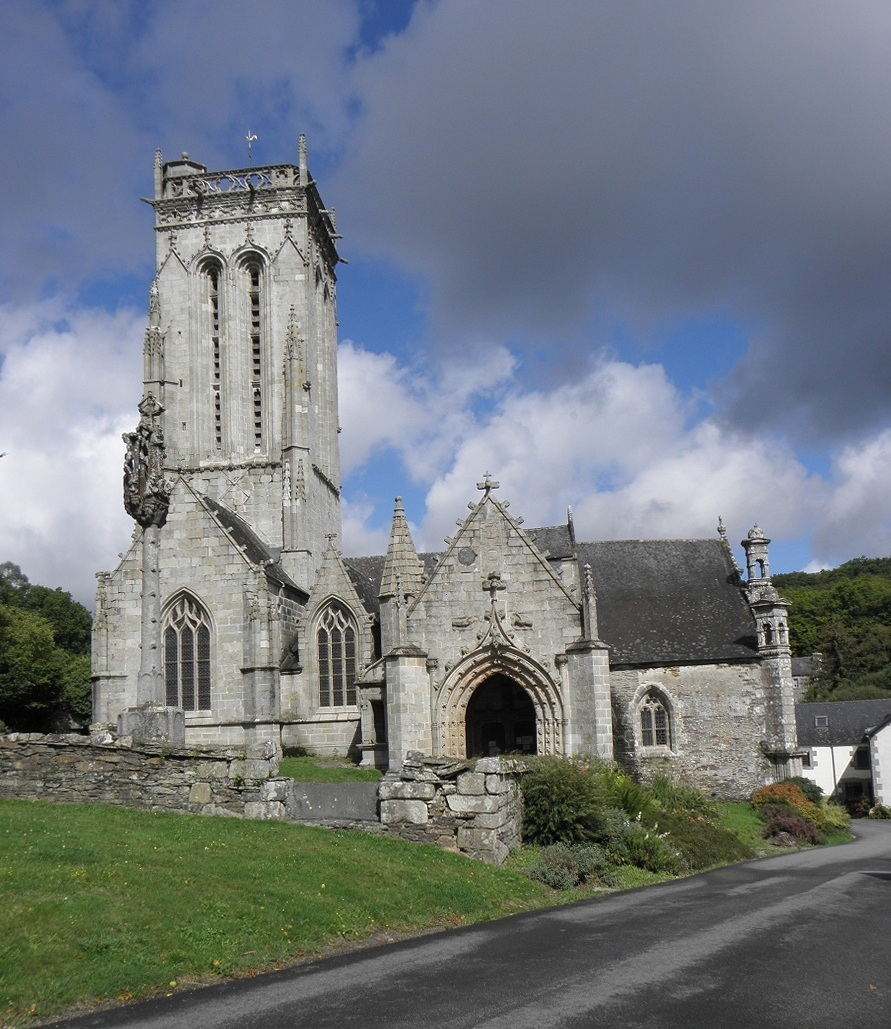 Vue méridionale de la chapelle de Saint-Herbot (29). .